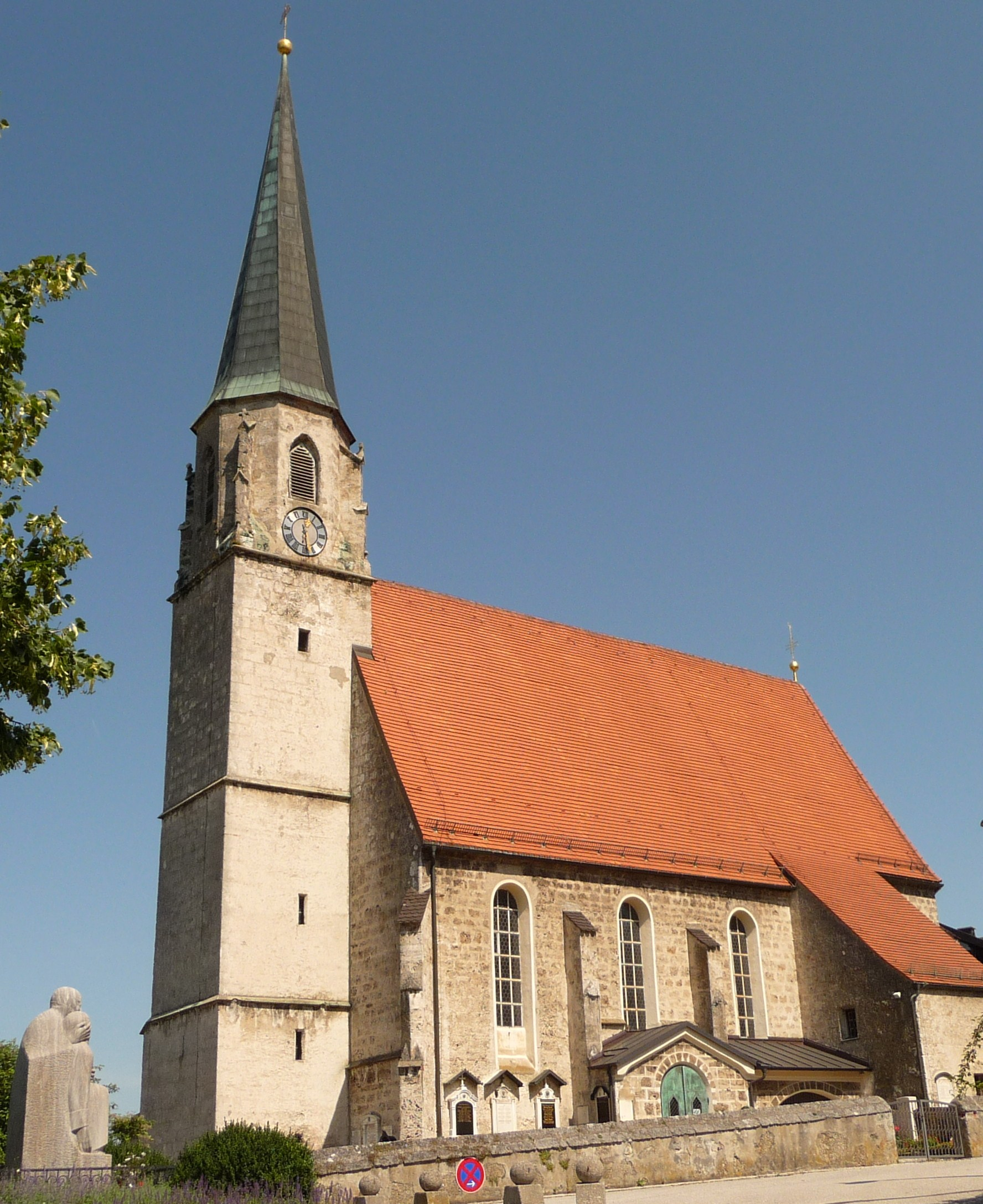 Die Nebenkirche St. Johannes der Täufer in Burgkirchen an der Alz